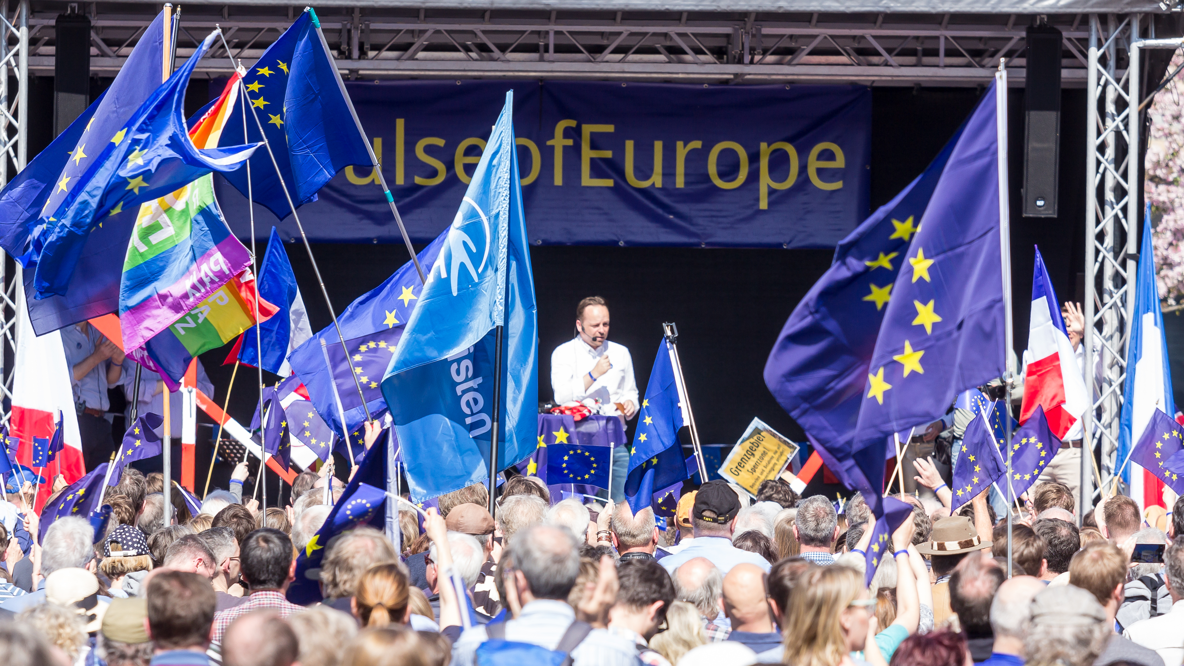 Pulse of Europe in Frankfurt am Main 2017-04-09